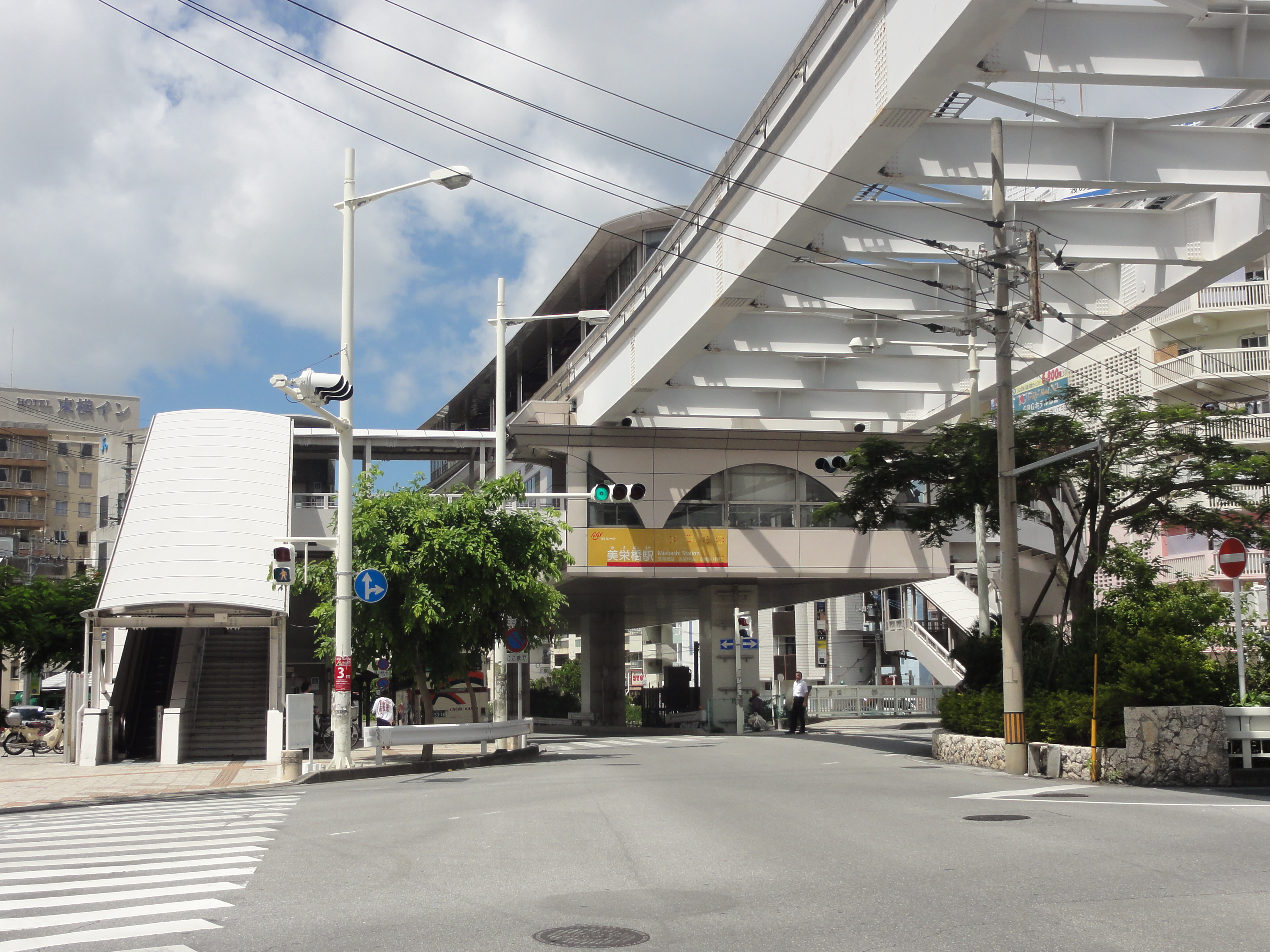 沖縄都市モノレール美栄橋駅